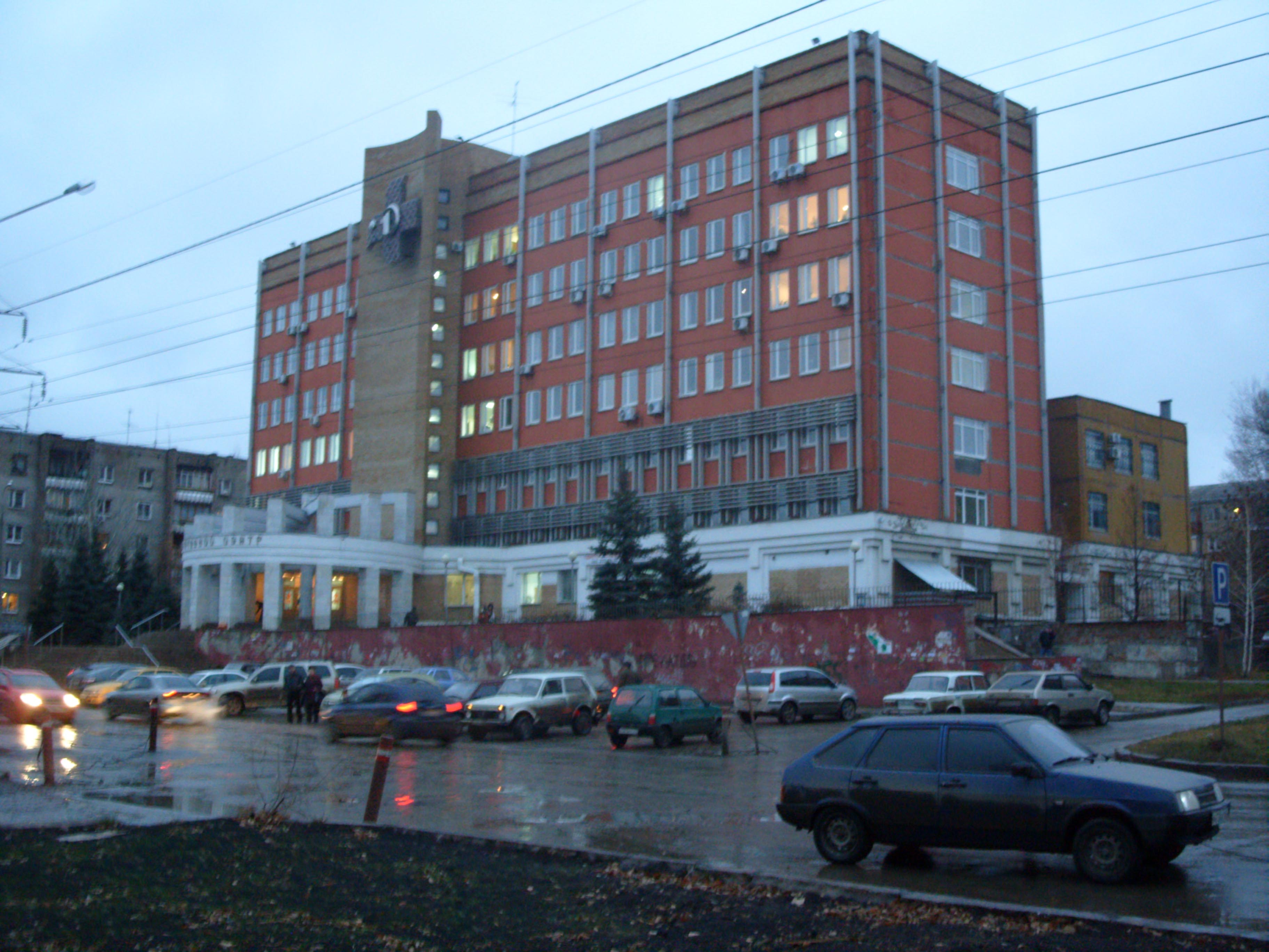 Miagi st. in Samara